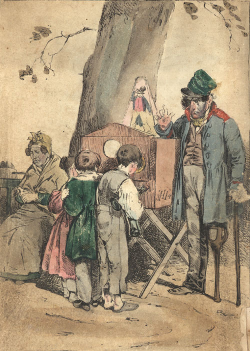 Illustration to Adolph Glasbrenner's Guckkästen (Kinder an einem Guckkasten)